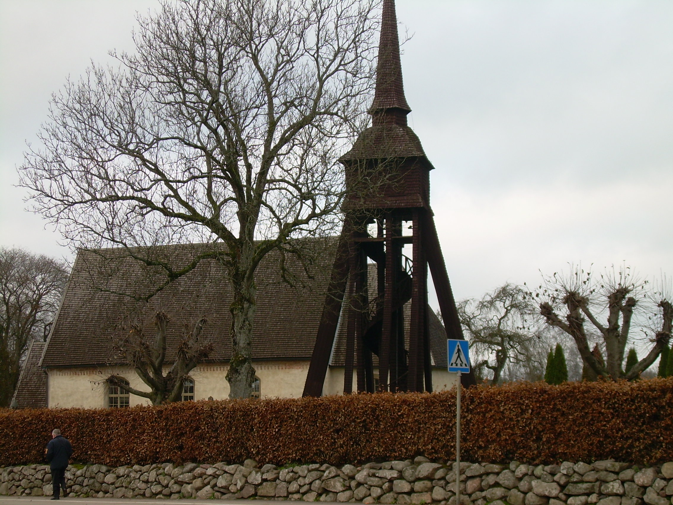 Alvesta kyrka (från söder)